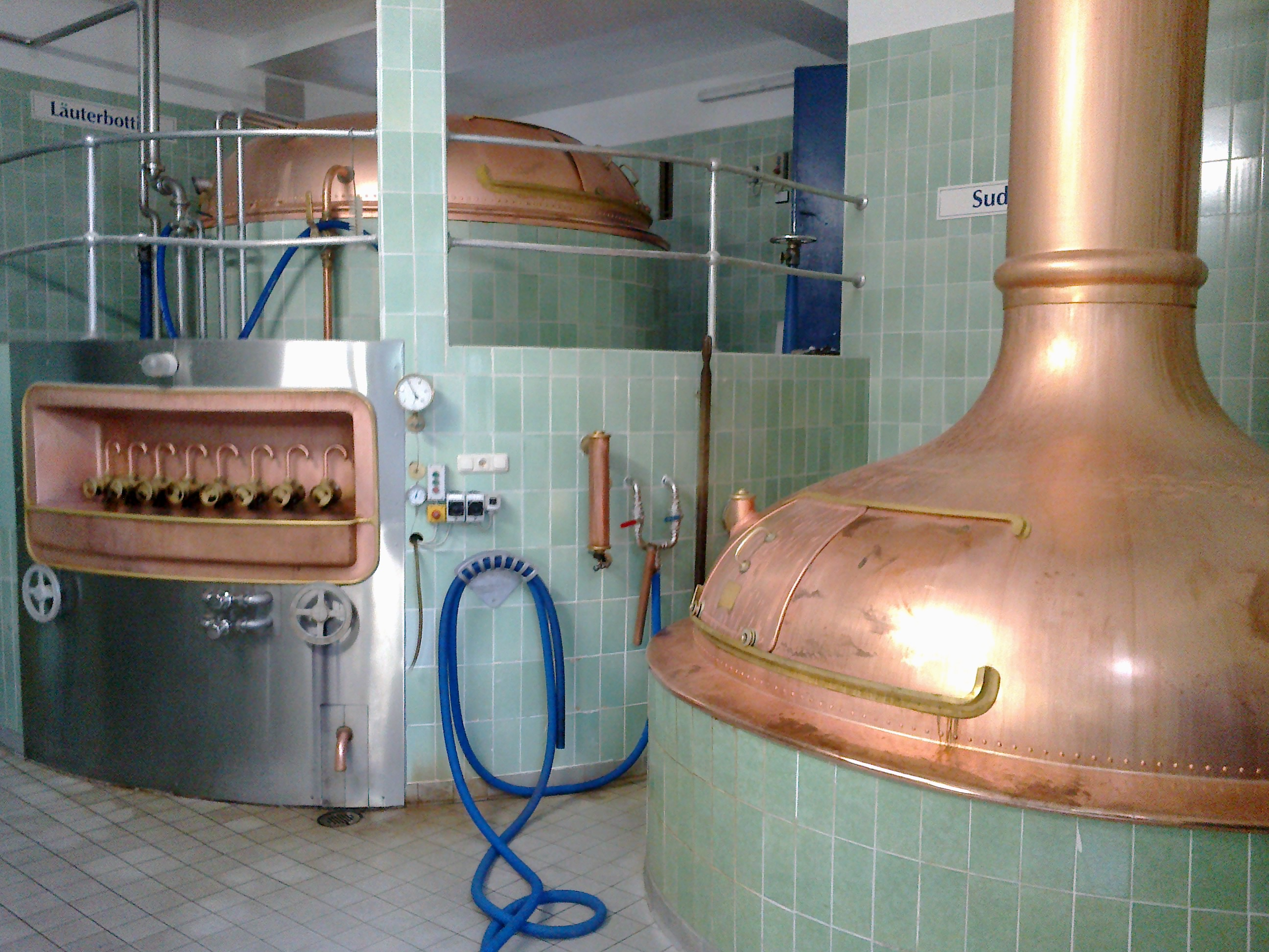 Klosterbrauerei Reutberg, Läuterbottich und Würzepfanne